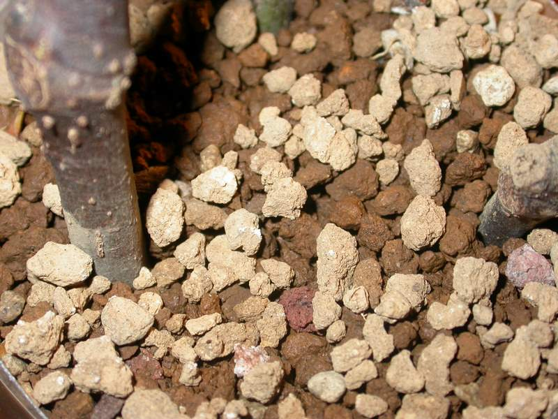 Akadama - Argile japonaise utilisée pour la culture des bonsaï - Japanese argile used for bonsaï